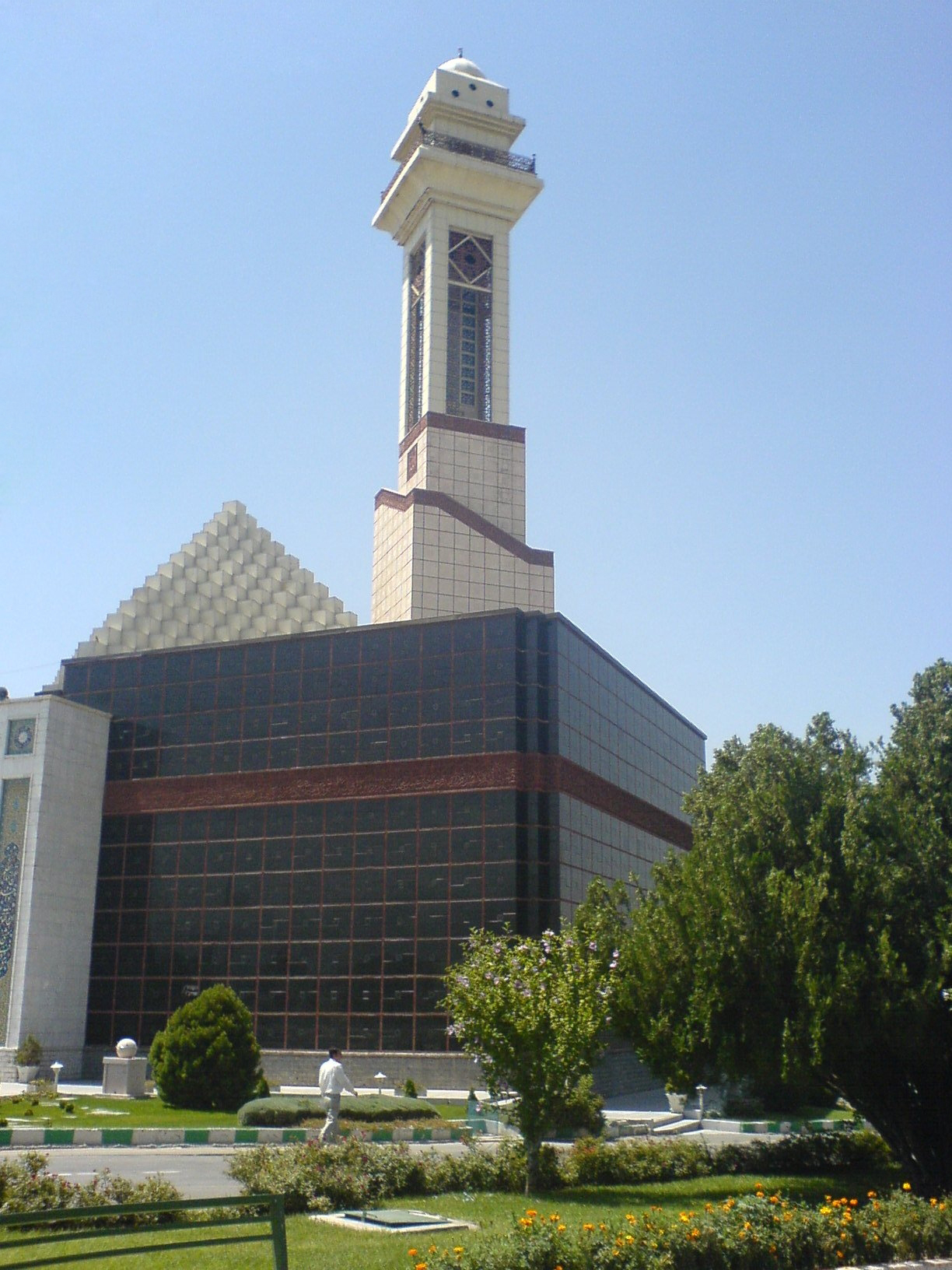 نمایشگاه بین المللی